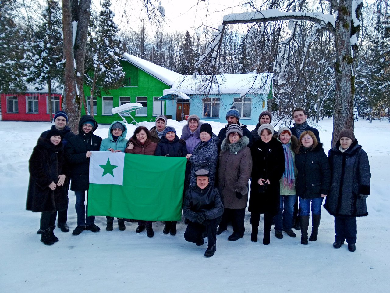 Komuna foto dum APERo-12